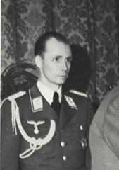 März 1941: Adolf Hitler verleiht Flugkapitän Hanna Reitsch das Eiserne Kreuz [2. Klasse] Mitte: Hermann Göring Information added by Wikimedia users. Additional description: Depicted person (left): *von Below, Nicolaus: Nicolaus von Below, Luftwaffenadjutant von Adolf Hitler.